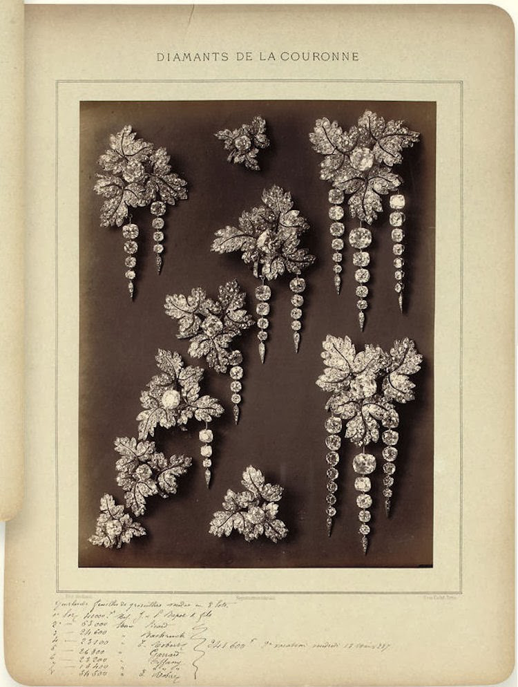 Bijoux de la couronne de France, broches et clips en diamants couronne de France, couronnes et diadèmes de la couronne de France, vente dirigée par Maître Eugène Escribe ©Ader